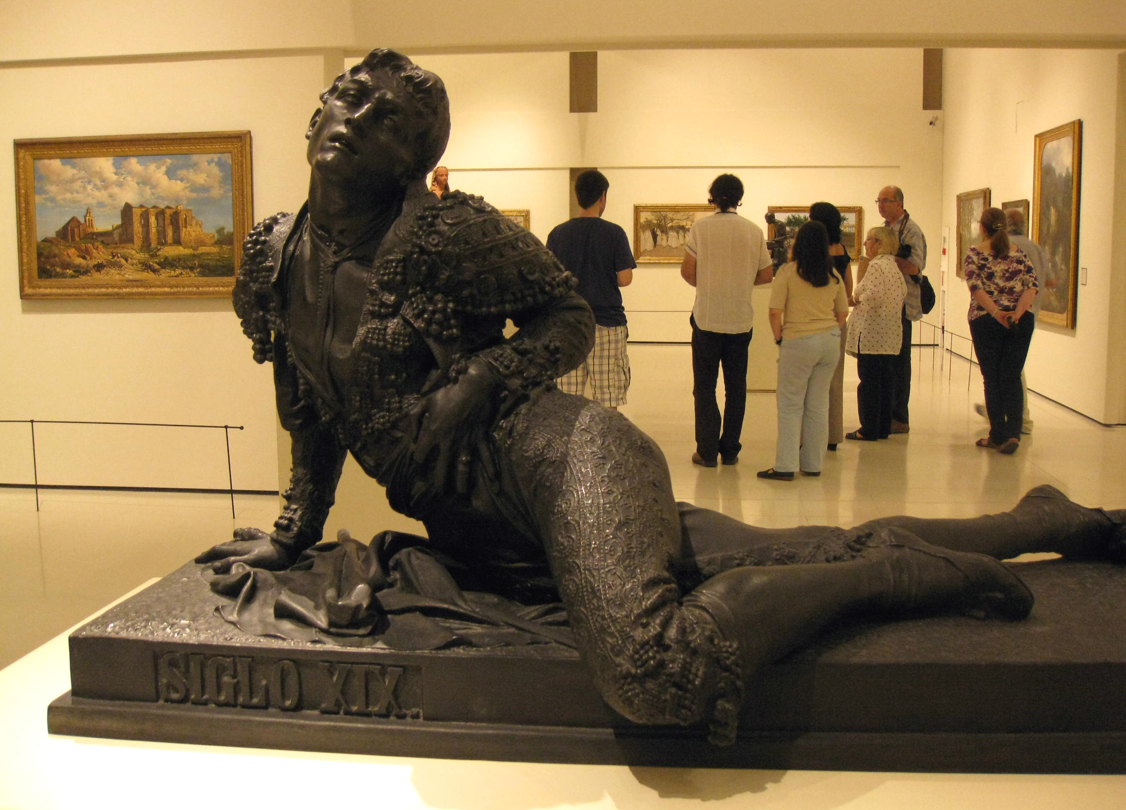 Palau Nacional (Barcelona)